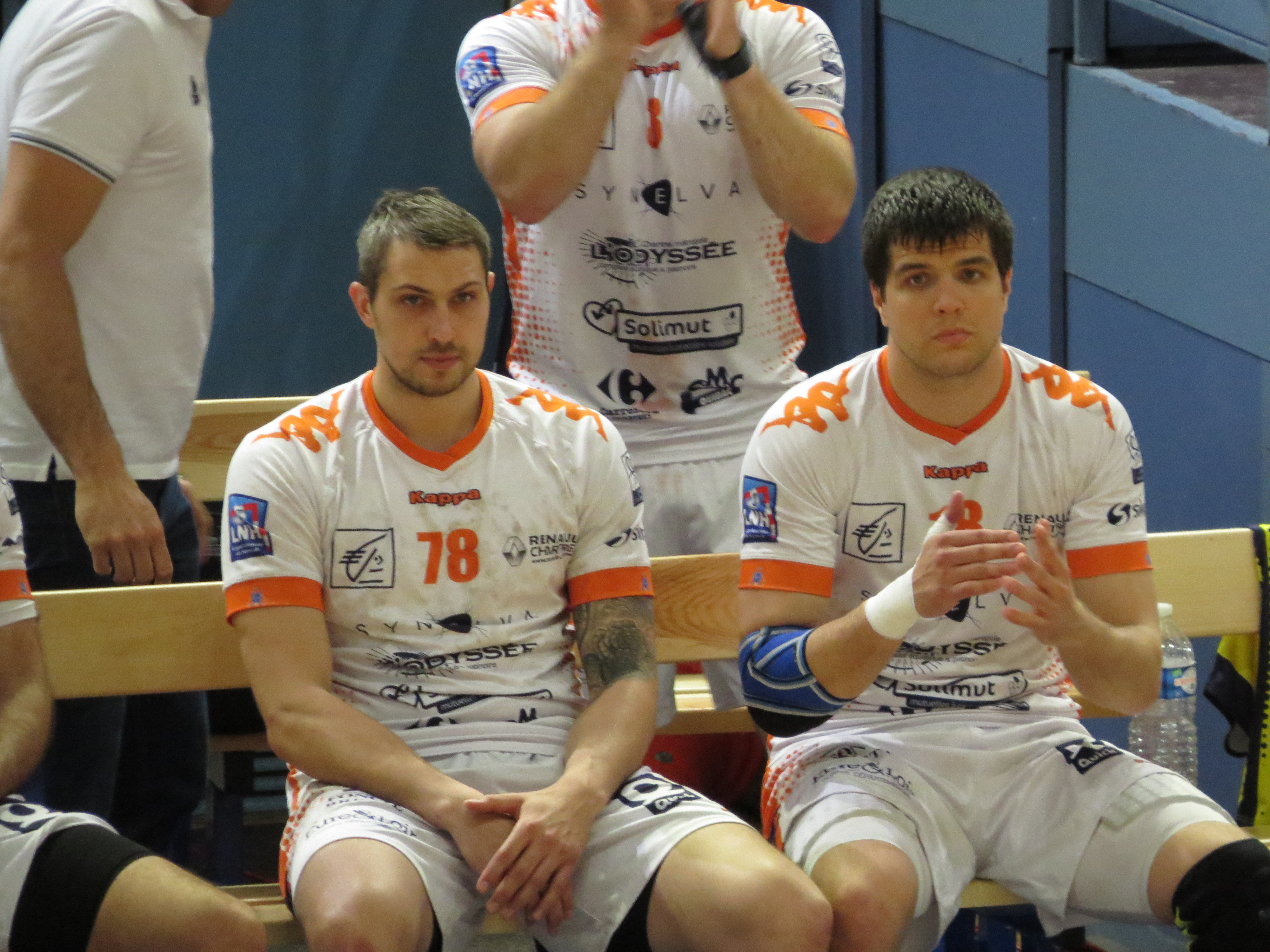 Match du championnat de France de Hand entre Créteil et Chartres Victoire de Créteil 39 - 35 78 : Alexander Pyshkin 18 : Sergey Kudinov